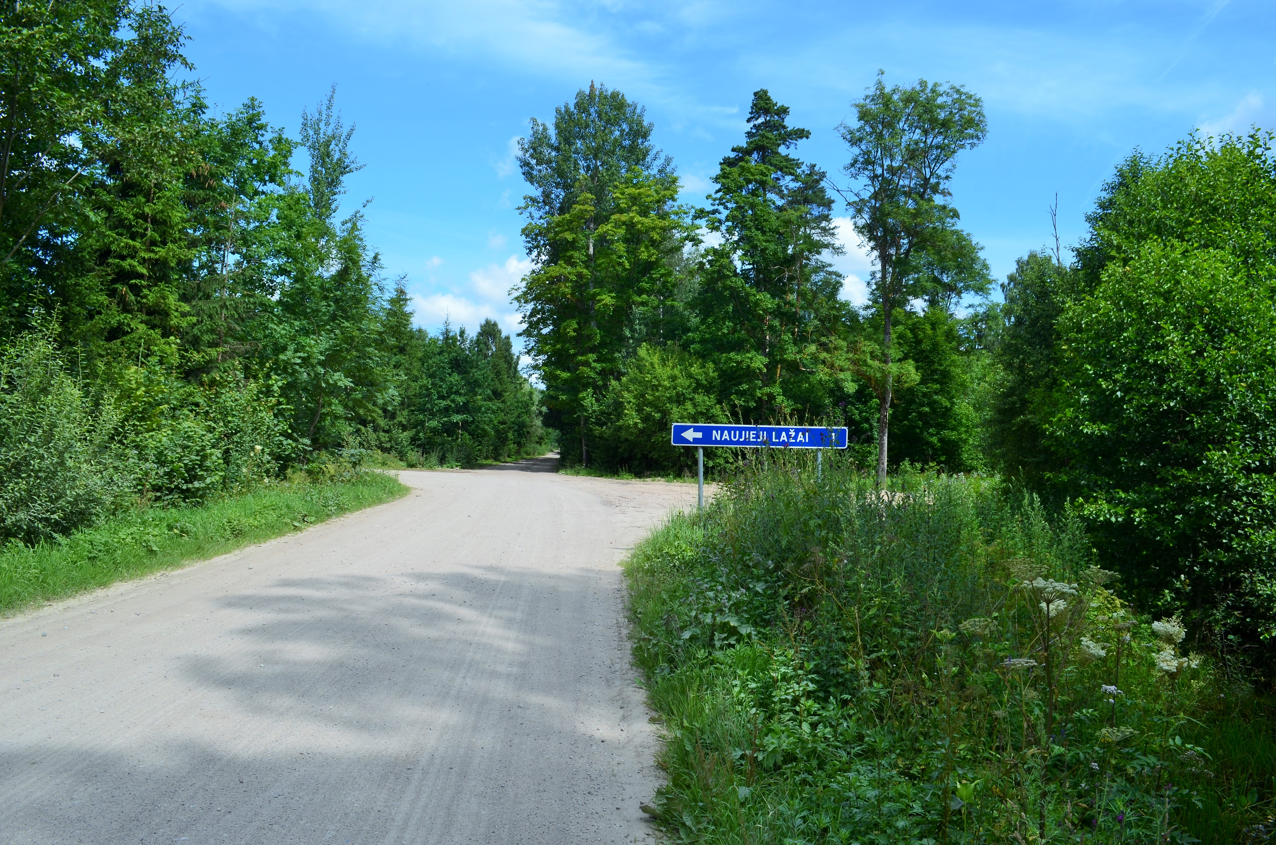 Sosių miškas, posūkis į N. Lažus, Kėdainių raj.